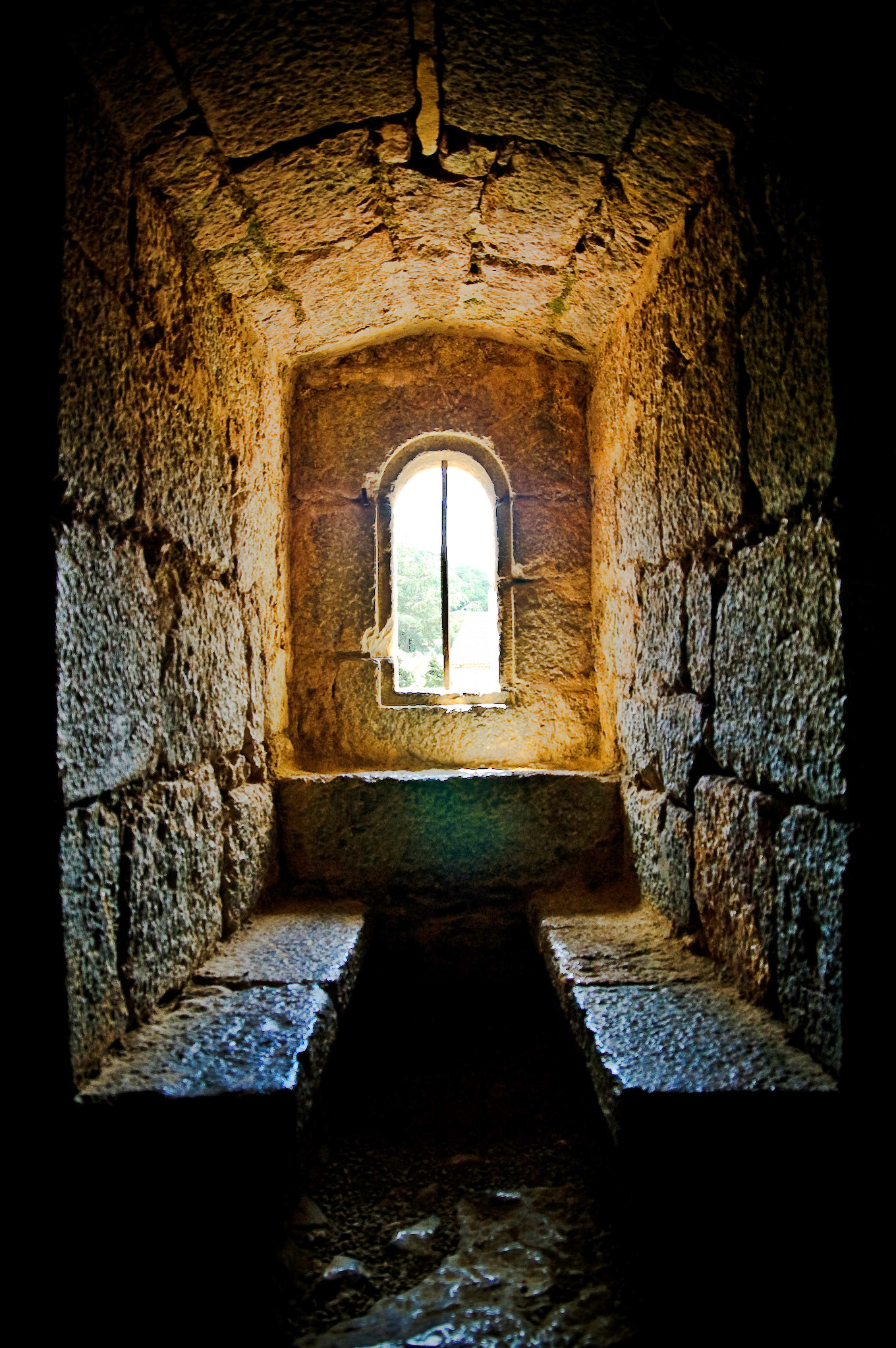 Le château de Villerouge-Termenès, niche vitrée